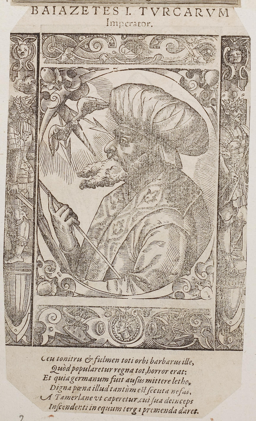 Grafik aus dem Klebeband Nr. 2 der Fürstlich Waldeckschen Hofbibliothek Arolsen Motiv: Bajazet I.